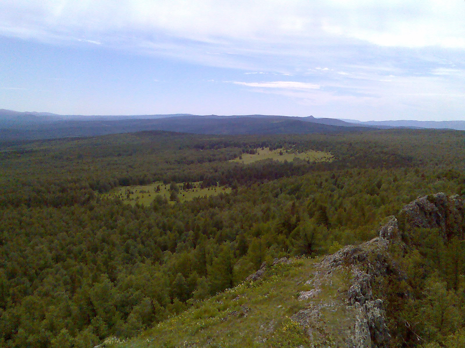 Вид на юг с вершины Курташтау